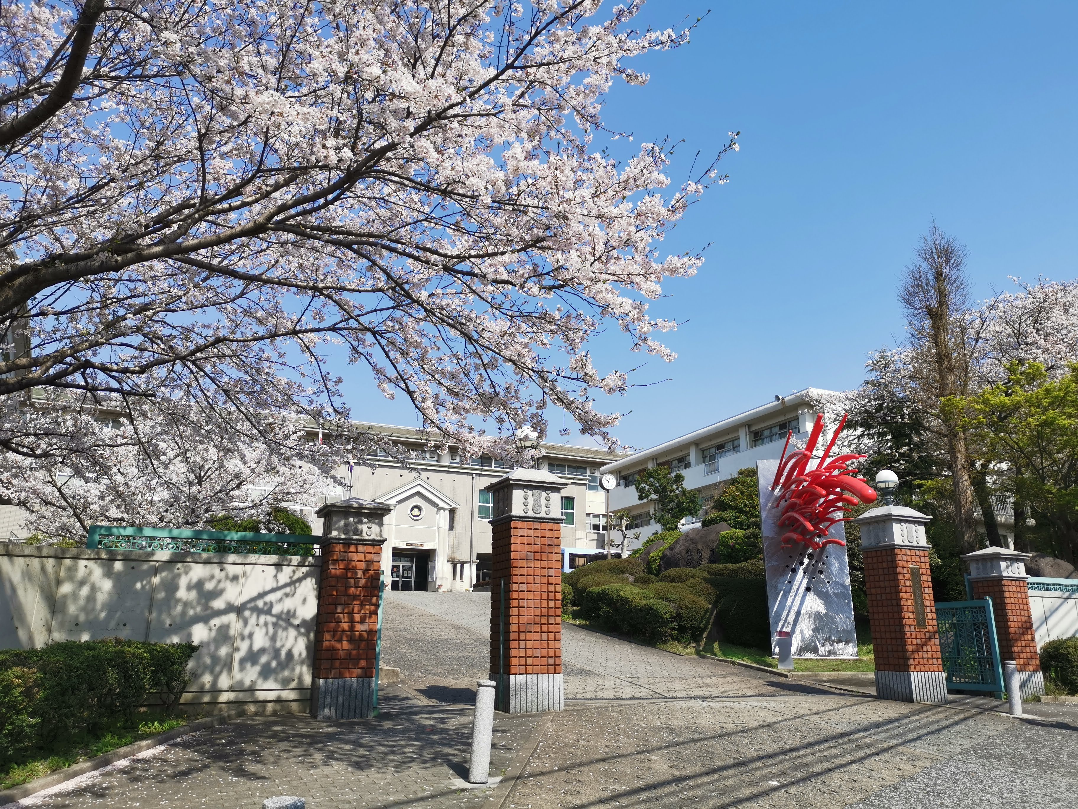 福岡県立小倉工業高等学校の正門です。